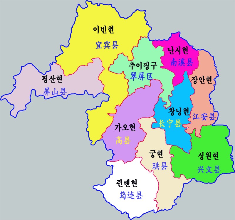 이빈시 현급행정구역